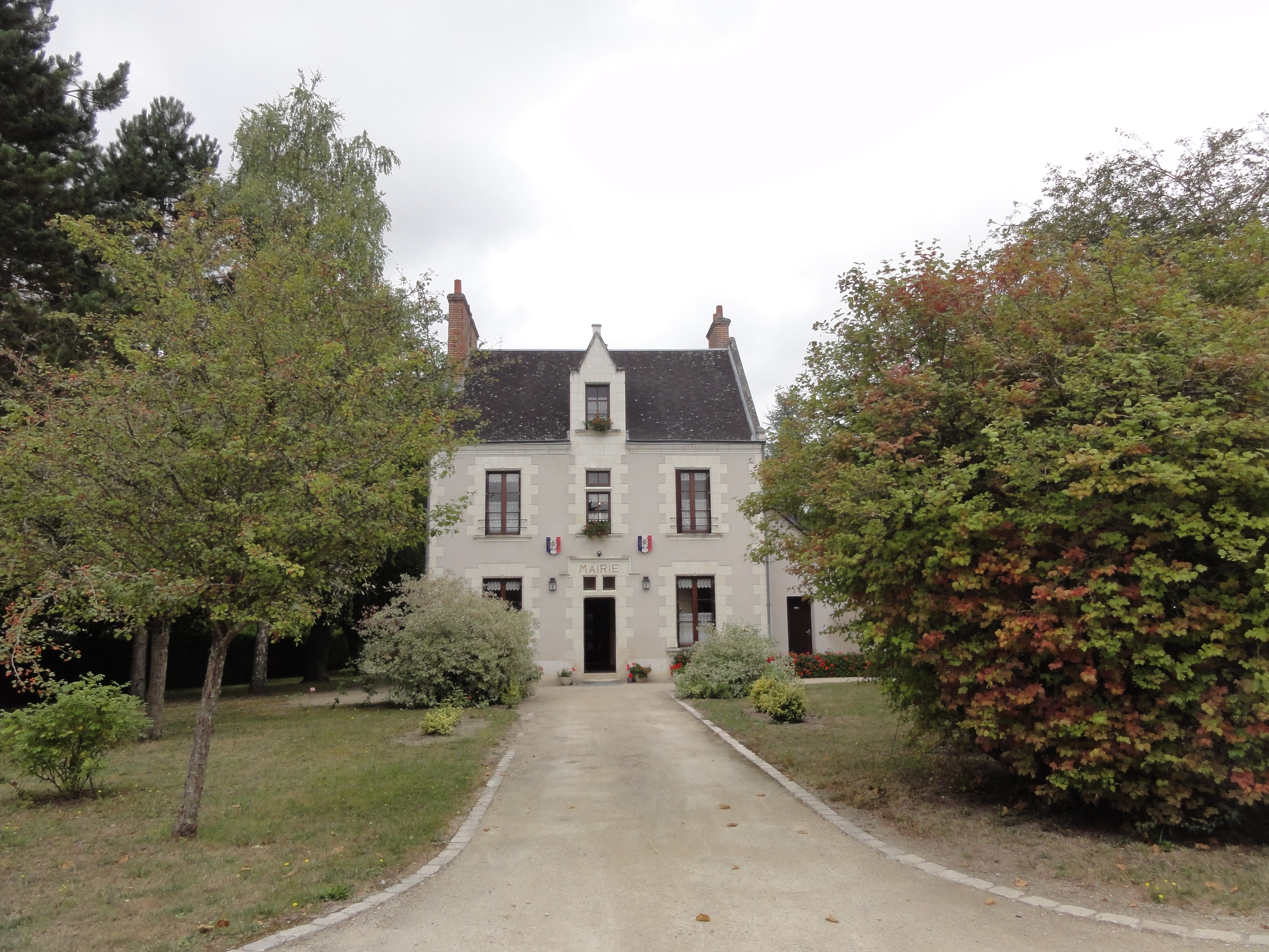 Fresnes (Loir-et-Cher) mairie